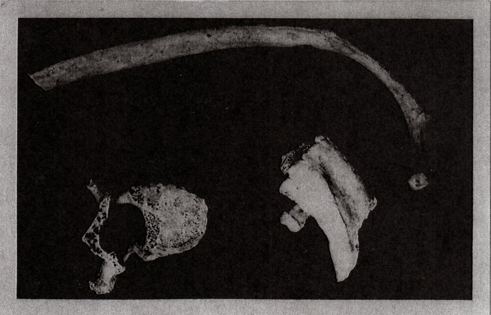 Carte postale des reliques de Saint Germain l'Ecossais le Scot en l'égise Saint-Germain l'Ecossais à Amiens